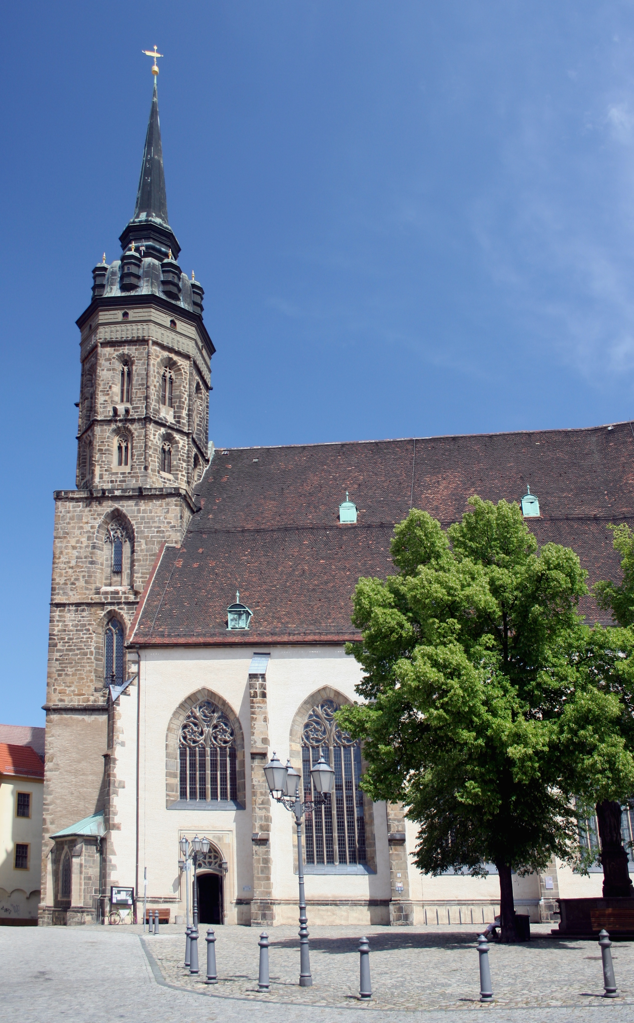 katedra św. Piotra w Budziszynie